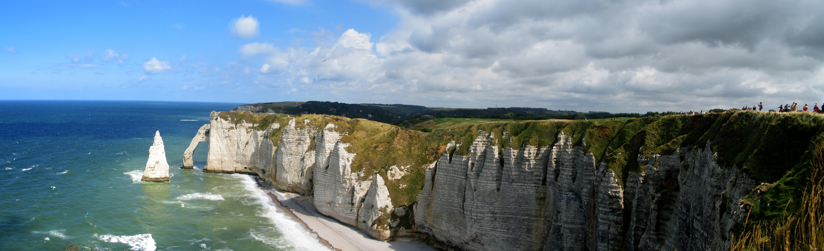 Un panoramique de l'aiguille d'Étretat en France